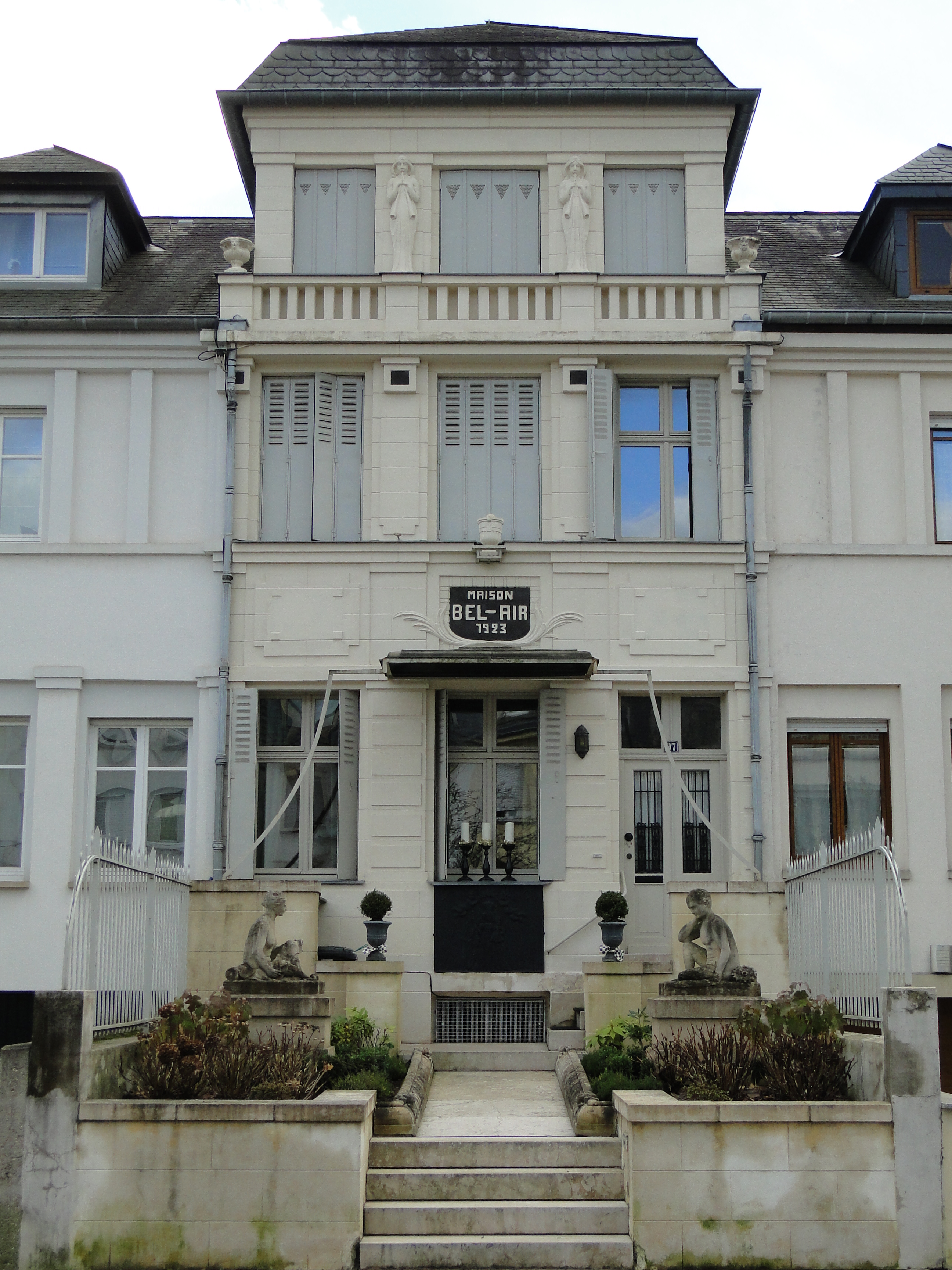 Maison "Bel-Air" construite en 1923 par Mathias Martin (1892-1941).